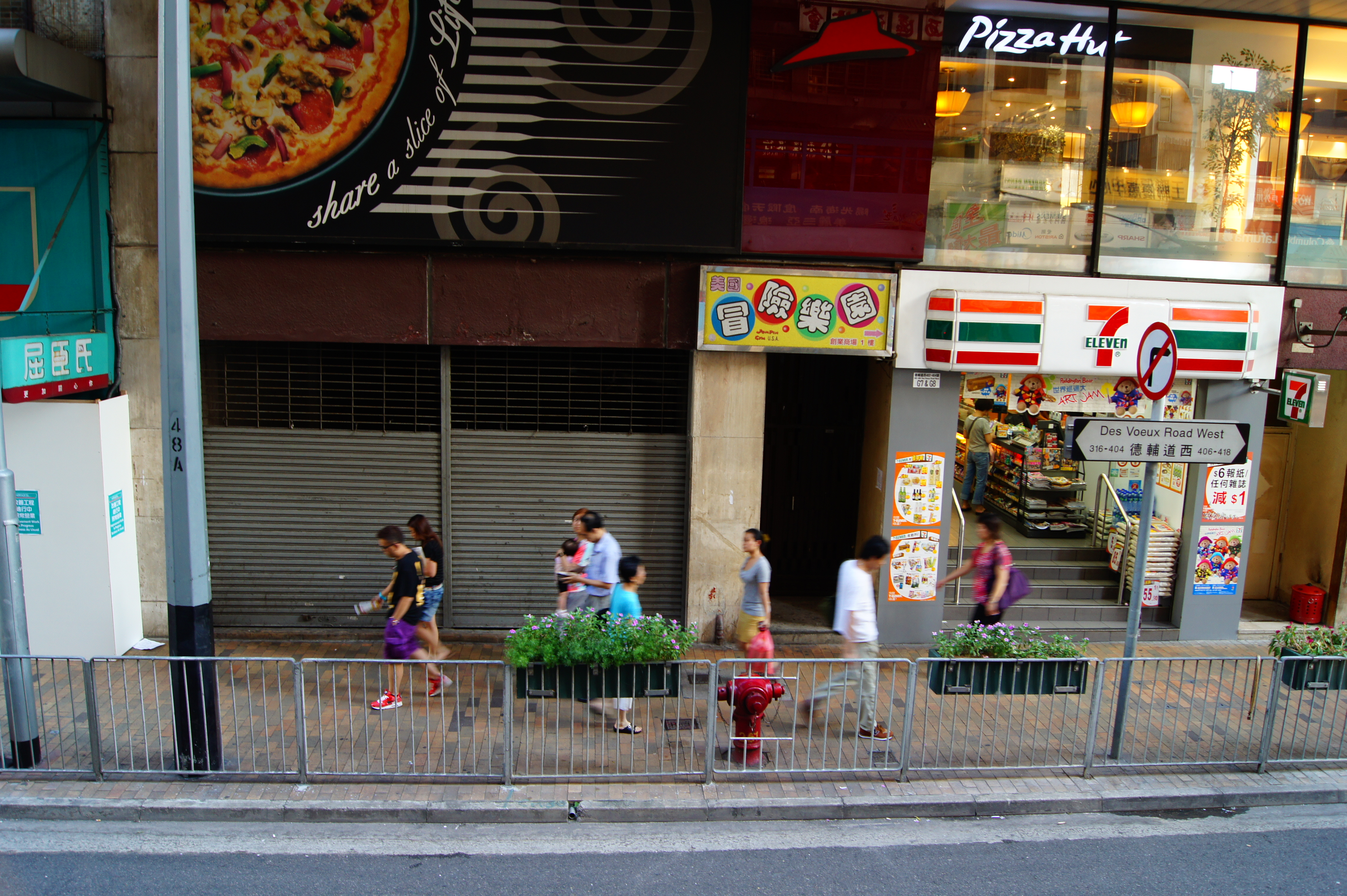 中文（香港）: 西港島綫屈地站預留出口